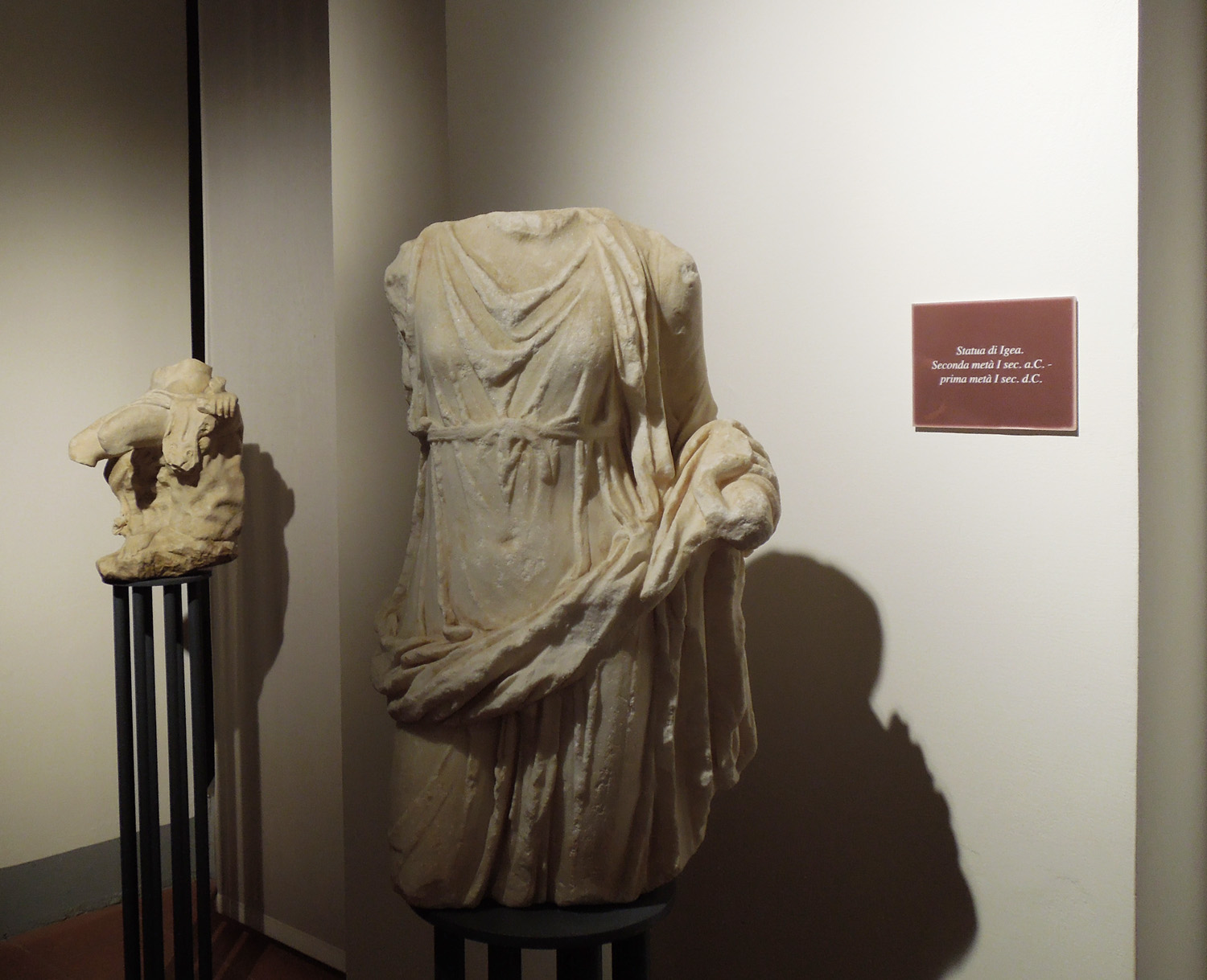 Statua di Igea, custodita presso il Museo archeologico Francesco Savini di Teramo.